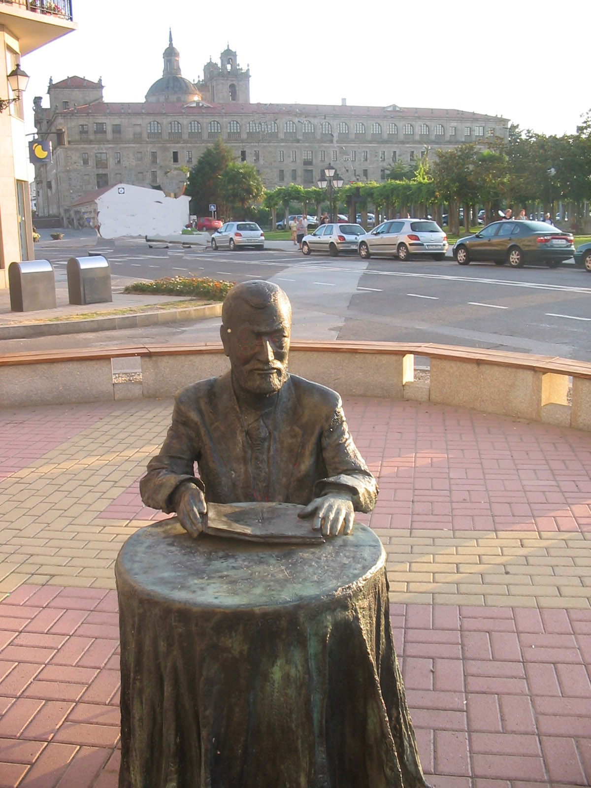 Manuel María, Galician Poet.Statue in Monforte de Lemos